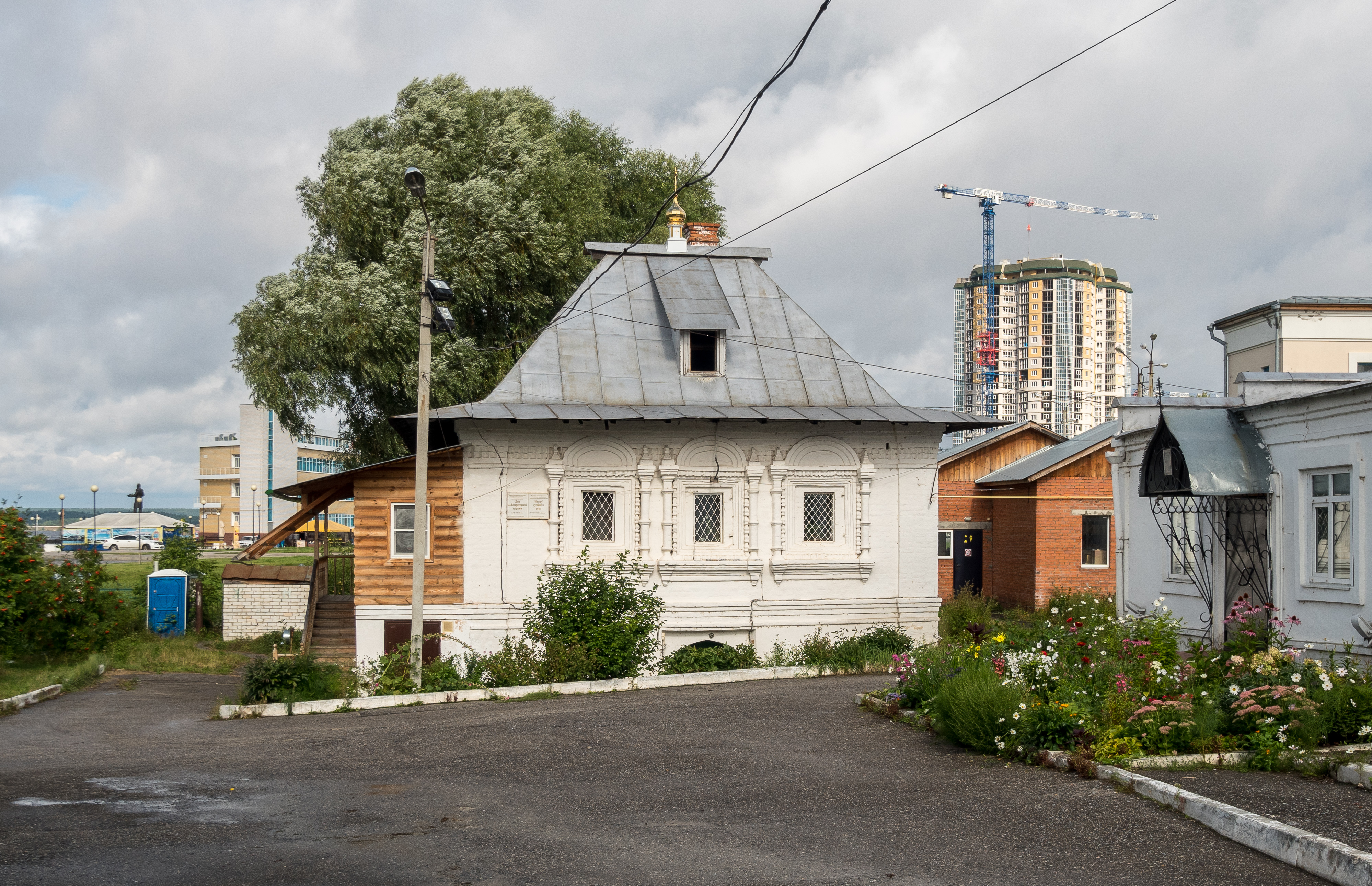 Дом при Воскресенской церкви (дом причта): улица Калинина, 17, Чебоксары, Чувашия